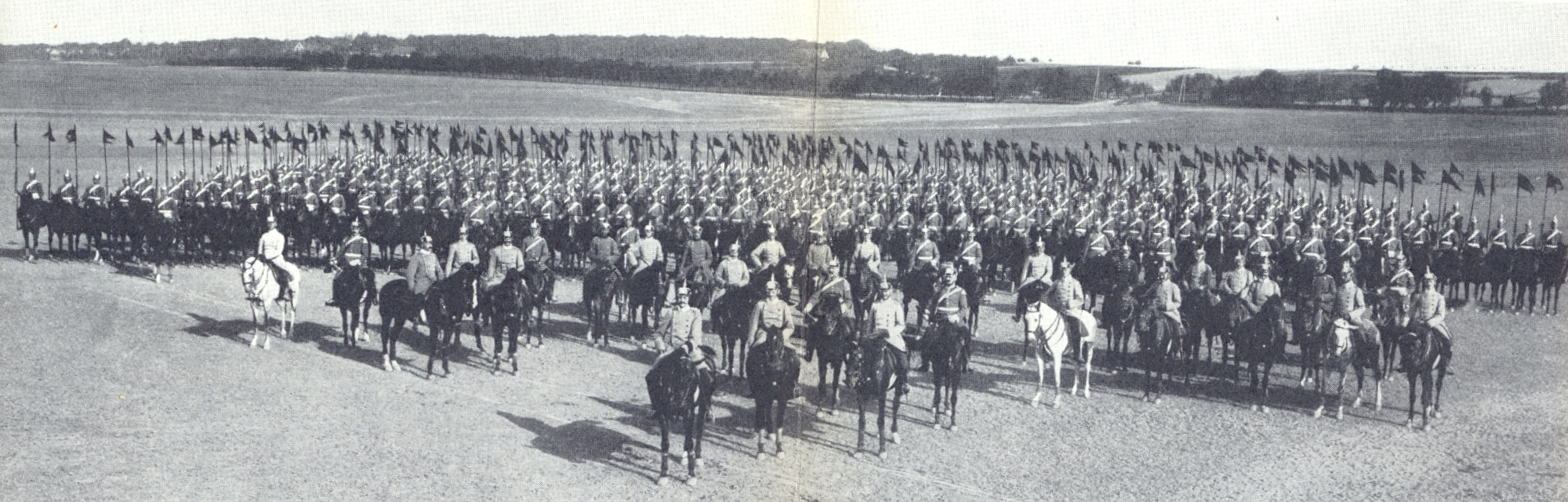 Bildunterschrift: DRAGONER-REGIMENT KÖNIGIN OLGA in Regimentskolonne auf dem Ludwigsburger Ecerzierplatz nach einem Regiments-Exerzieren Sommer 1907